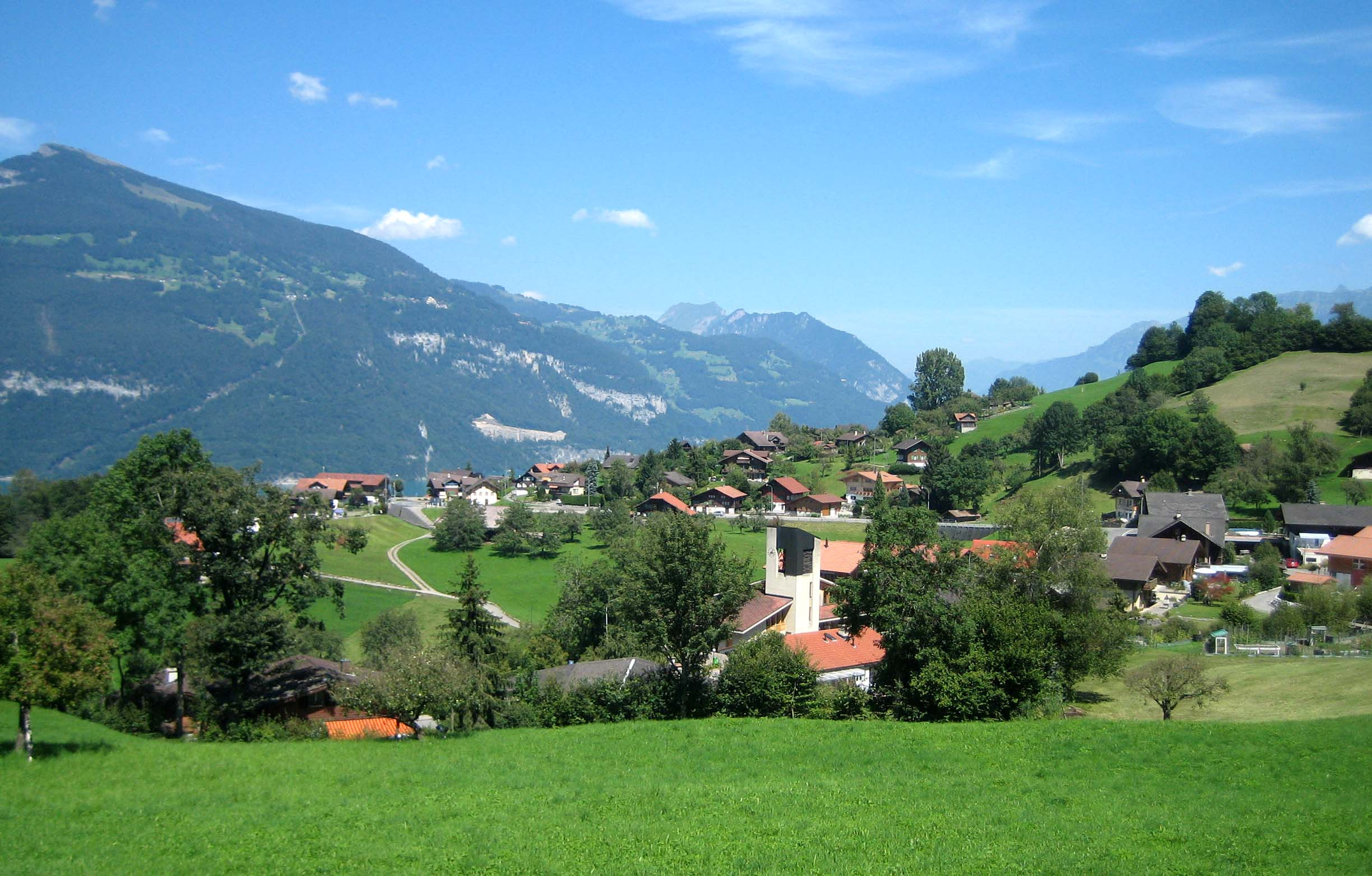 Krattigen